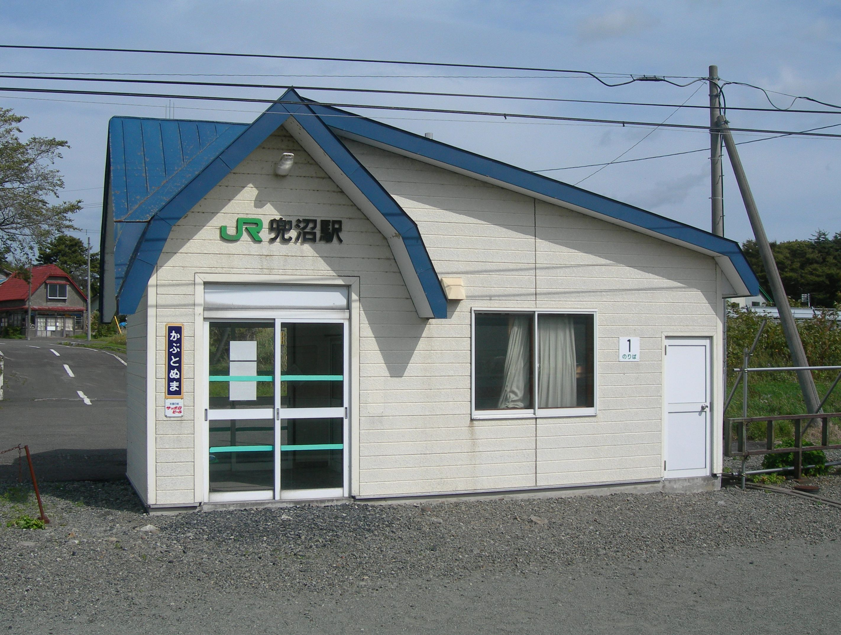 兜沼駅駅舎